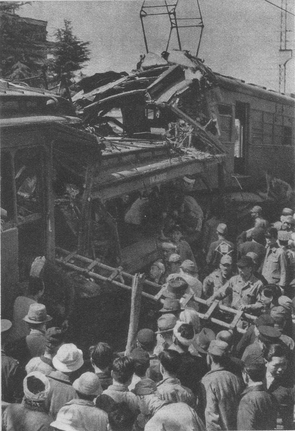 Kintetsu Nara-line, Kawachi-Hanazono station Train collision incident. Loc: Kawachi-Hanazono station. 近鉄奈良線列車暴走追突事故（昭和23年3月31日）。 撮影場所 奈良県・河内花園駅